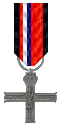 Verzetsherdenkingscruis Nederland 1980